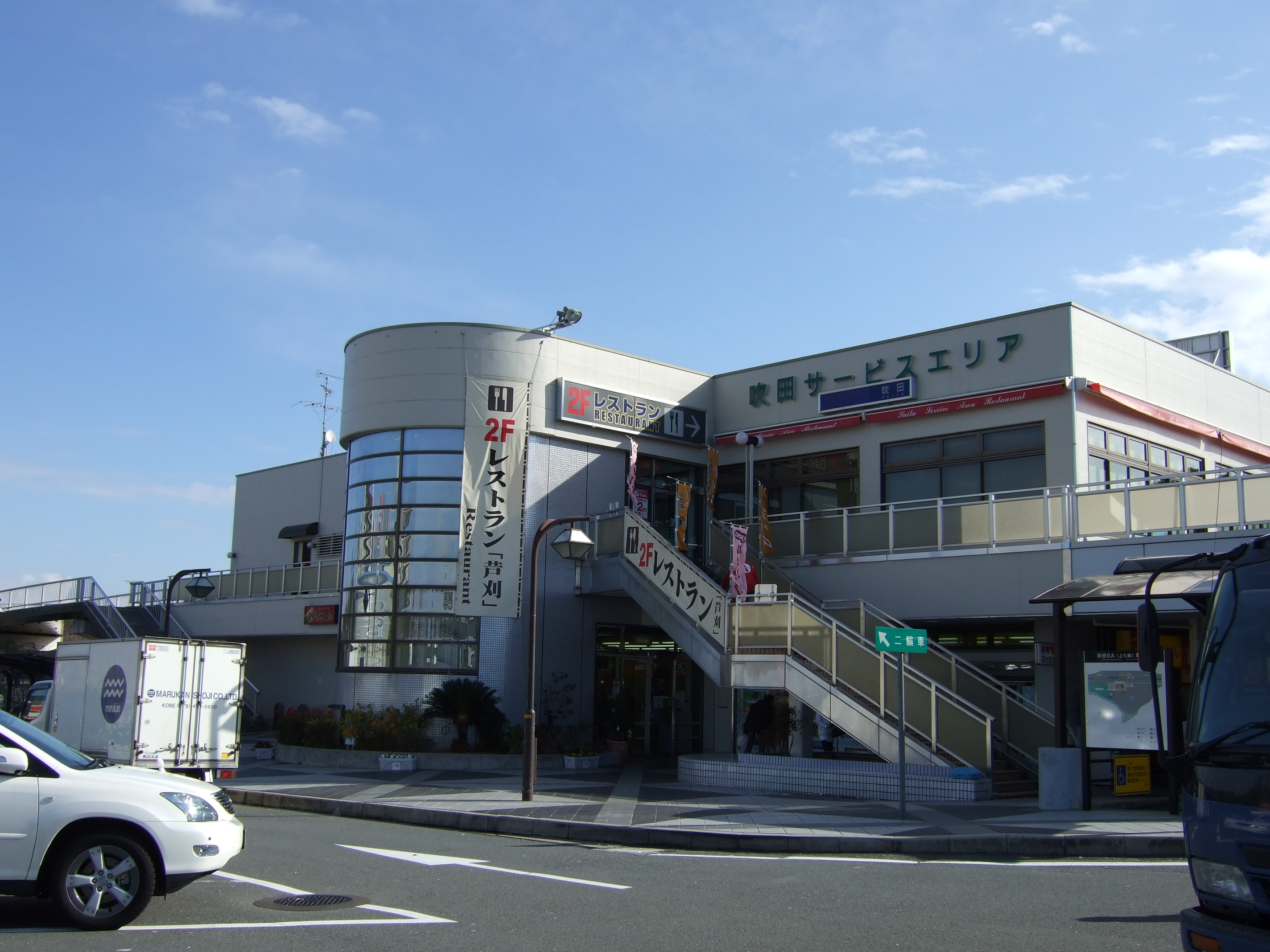 吹田サービスエリア